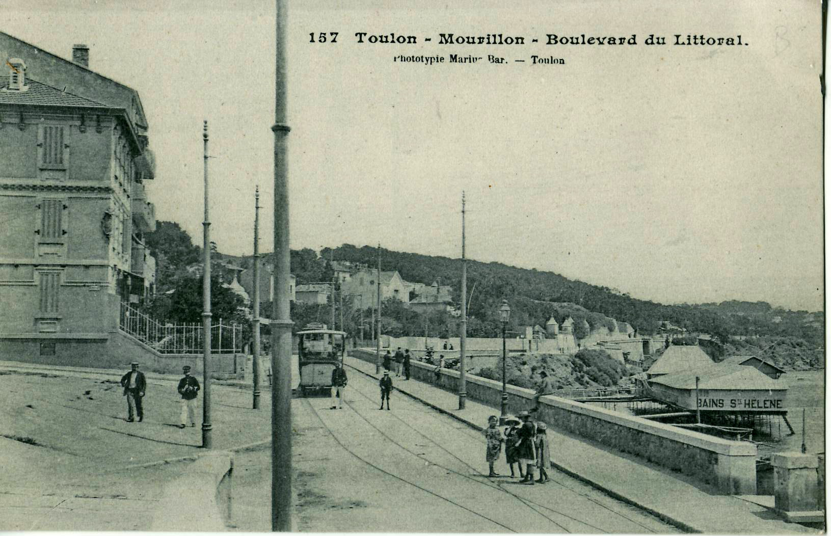 Carte postale ancienne éditée par le Marius Bar à Toulon, n°157 : Toulon - MOURILLON - Boulevard du Littoral